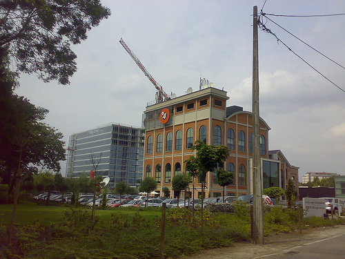 VT4 gebouw in Belgie